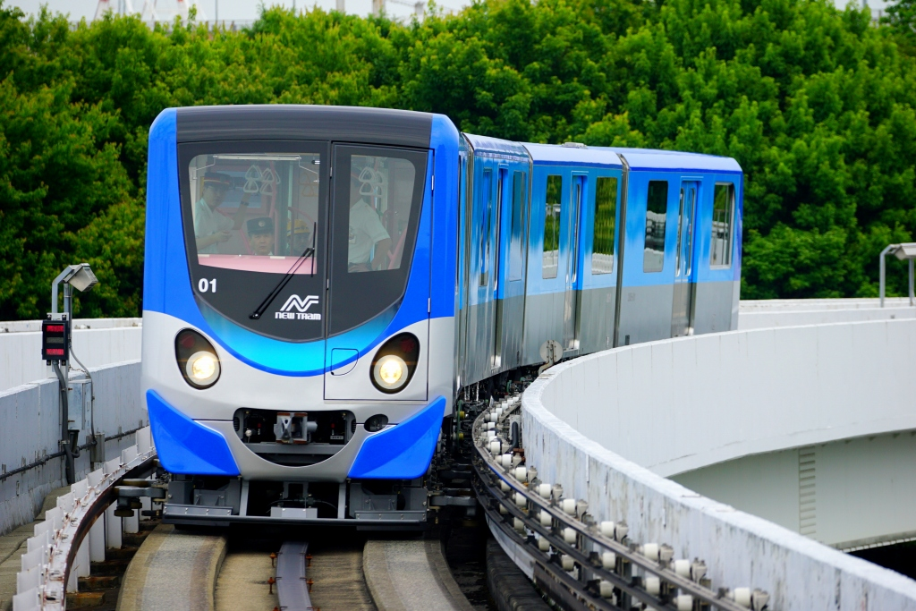 試運転中の200系電車